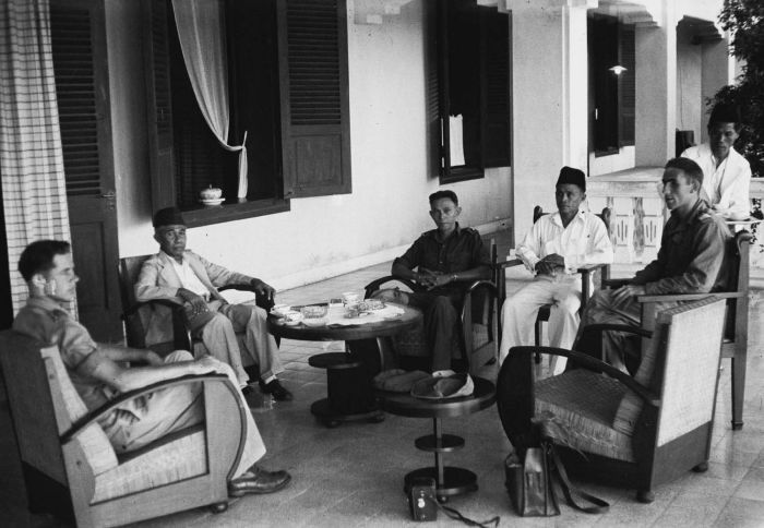 negatief. Nederlandse militairen op bezoek bij Sultan Muhammed Salahuddin van Bima